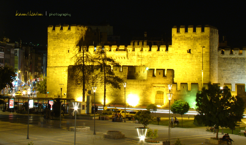 Kayseri Kalesi - Gece / night